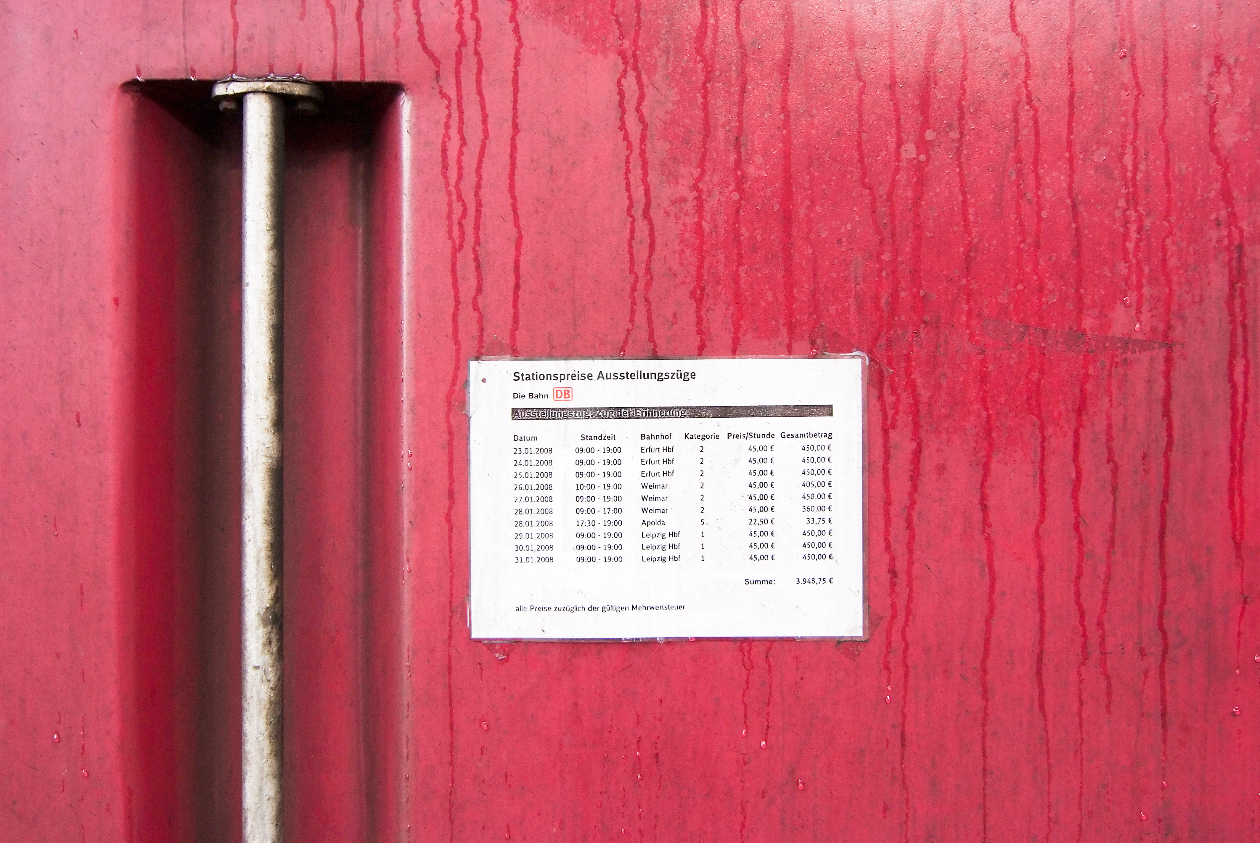 Zug der Erinnerung (Holocaust memorial train 2007/2008) in Kiel, 7-9 April 2008